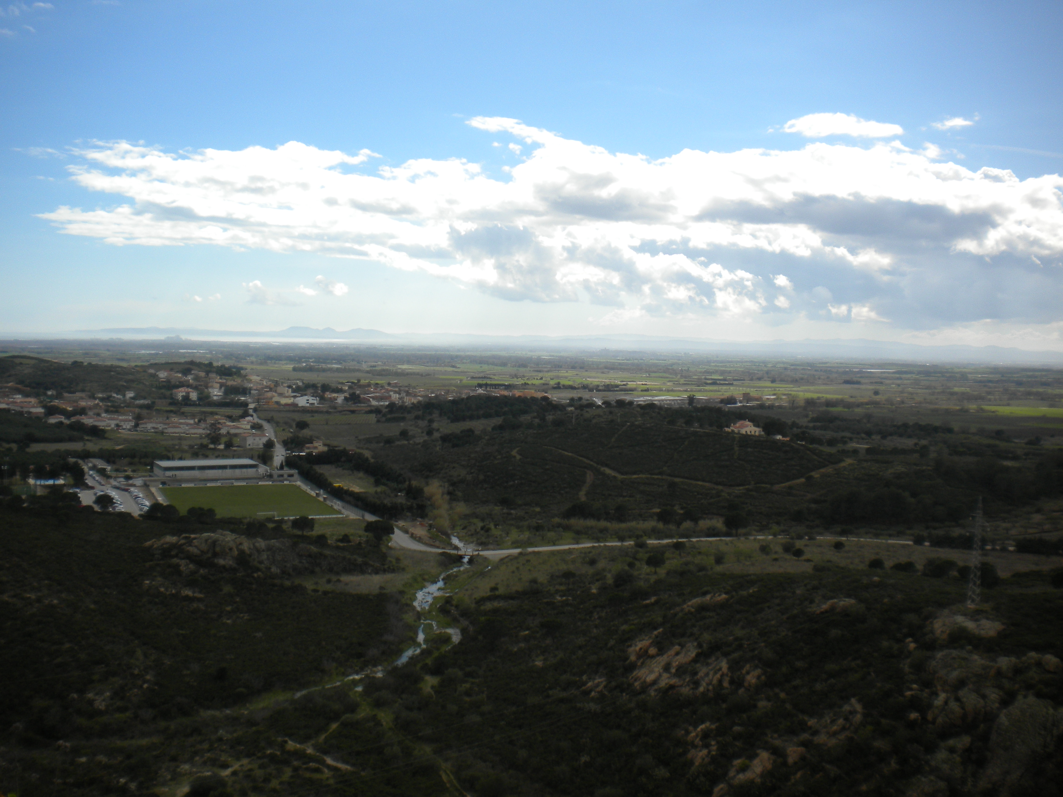 Vista de Vilajuïga, el camp de futbol i L'Argentinar des del Castell de Quermançó a la comarca de l'Alt Empordà.